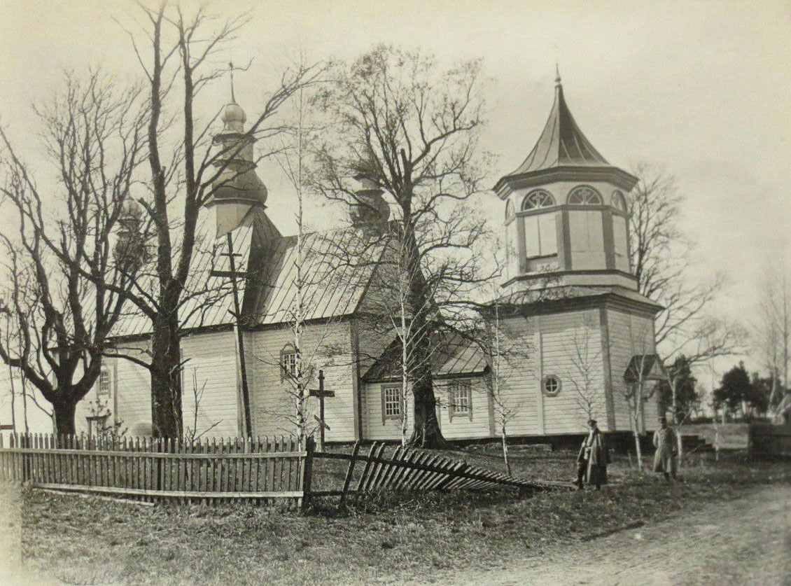 Беларуская (тарашкевіца): Олтуш (Ołtuš). Царква